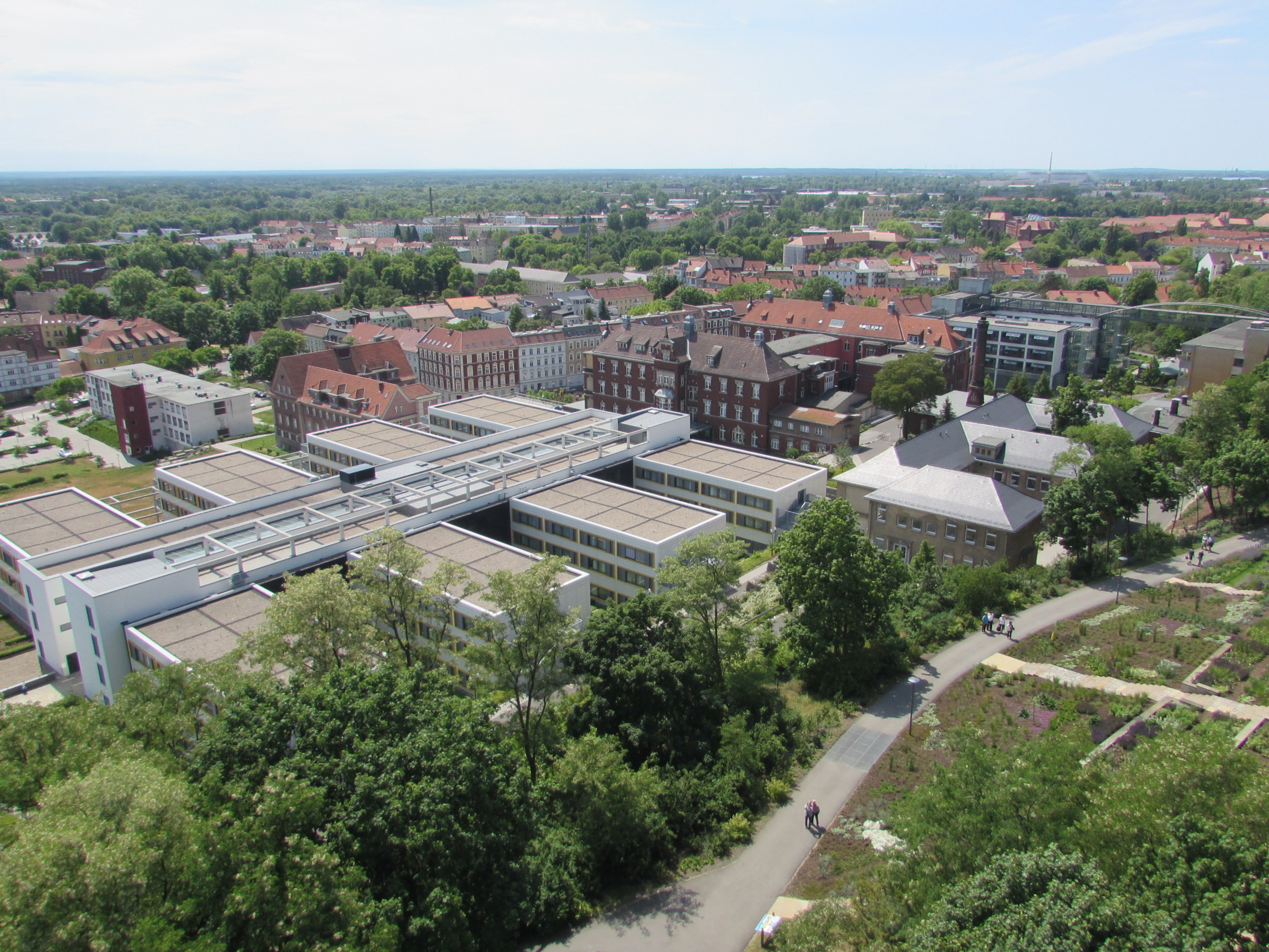 städtisches klinikum brandenburg von friedenswarte gesehen